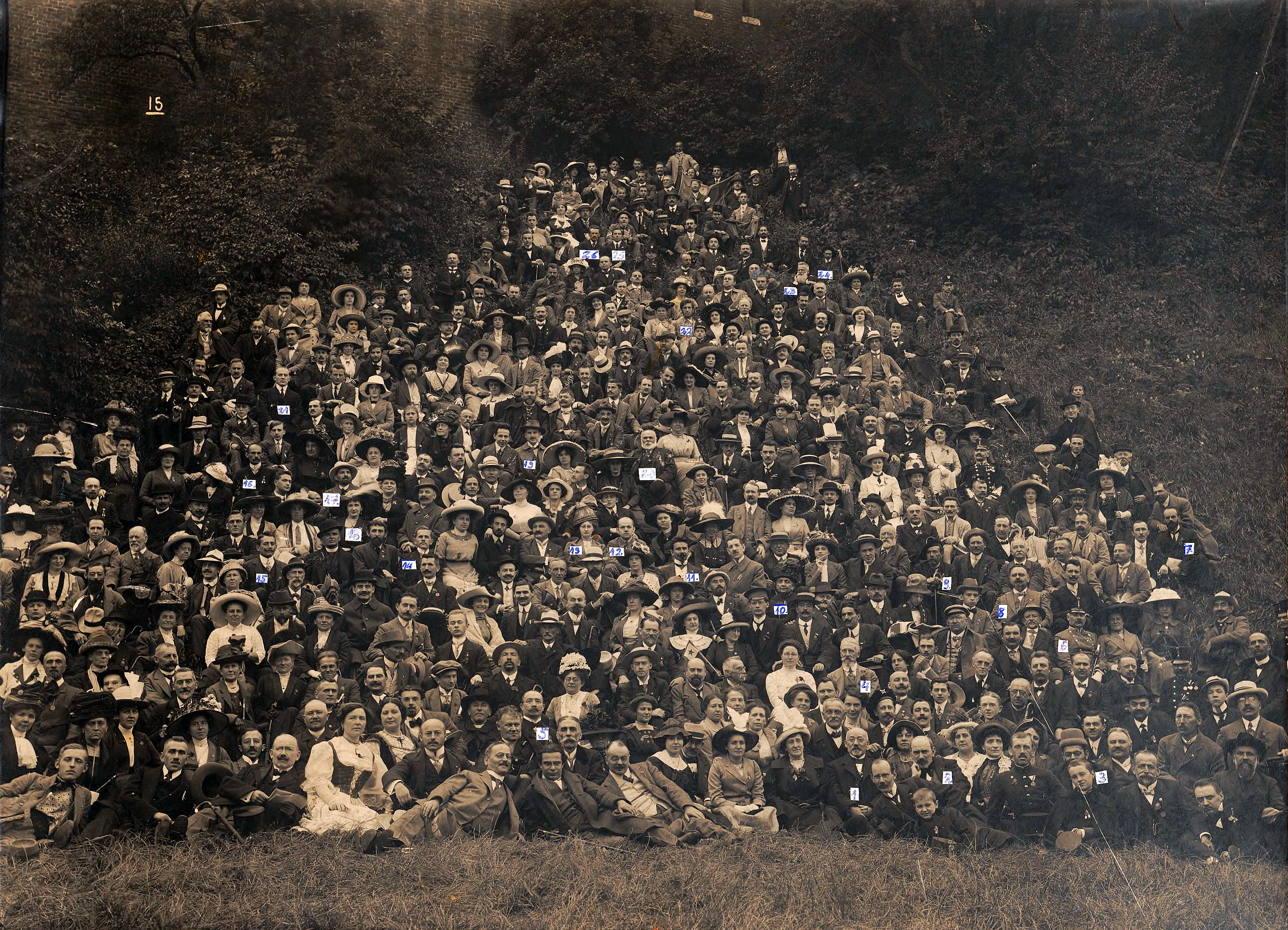 Komuna foto de la partoprenantoj de la 8-a UK en Krakovo, 1912, farita sur deklivo ĉe Wawel.